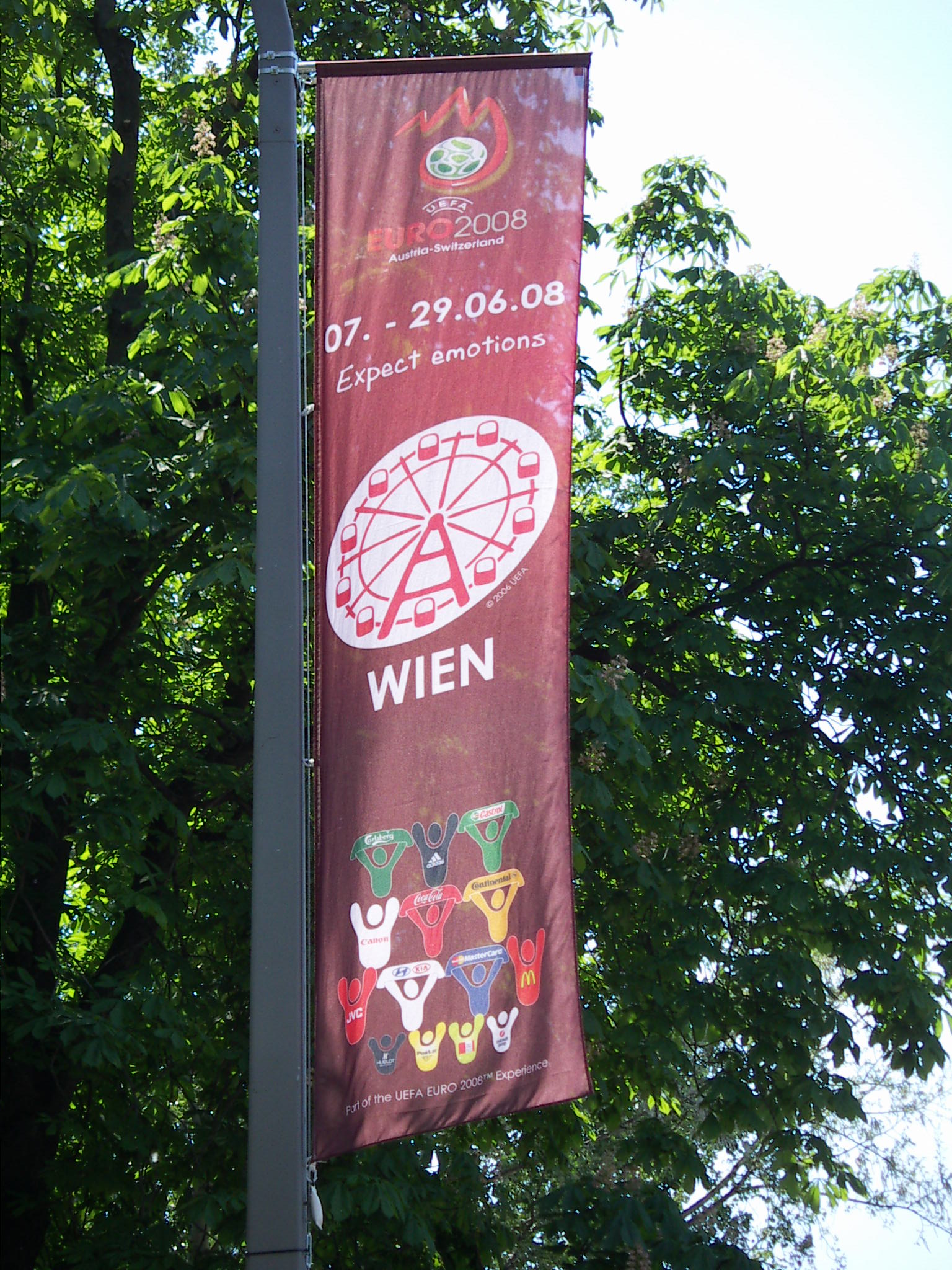 Fahne, EURO 2008, vor dem Ernst-Happel-Stadion